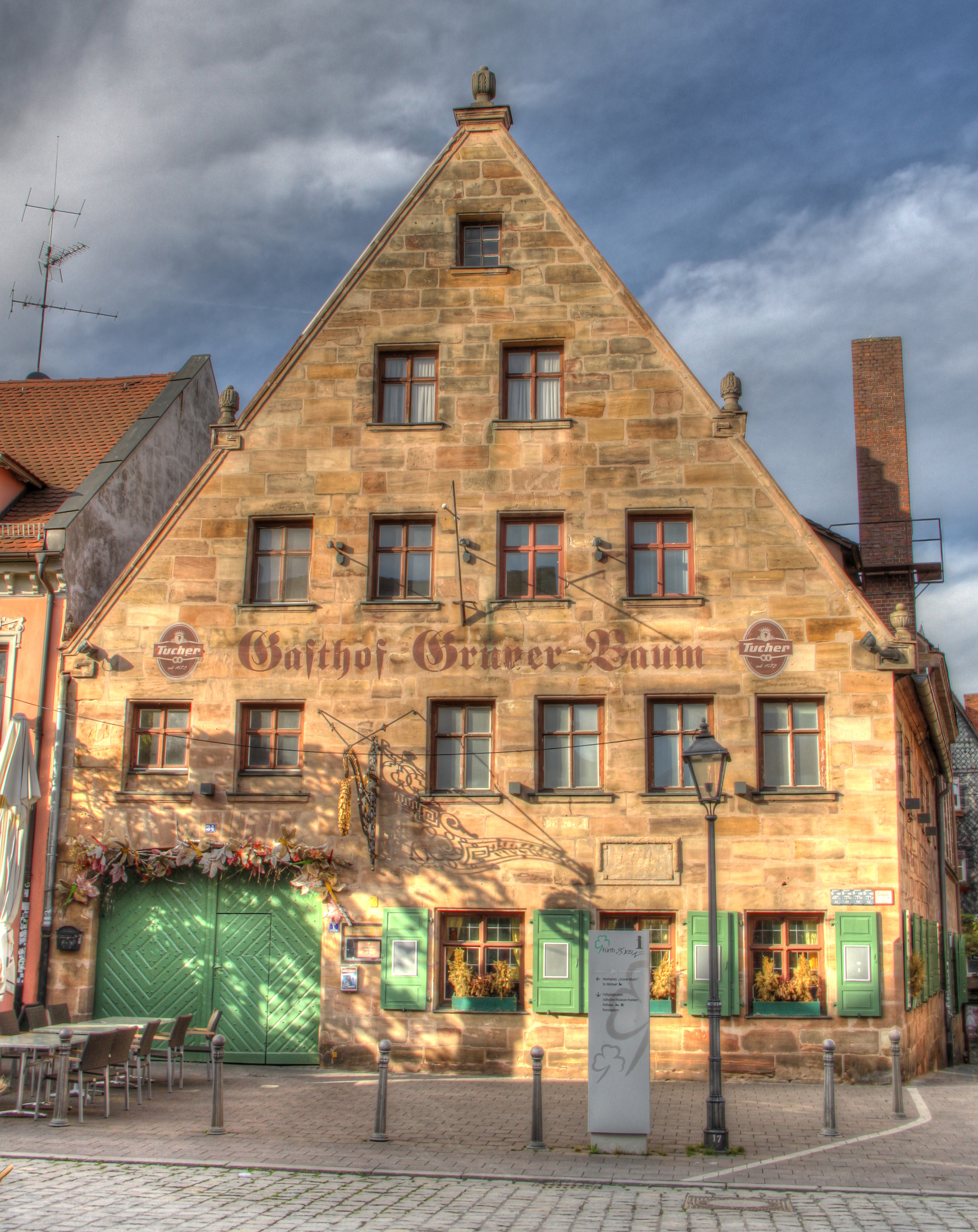 Gaststäte Grüner BAum in Fürth, Gustavstraße 34